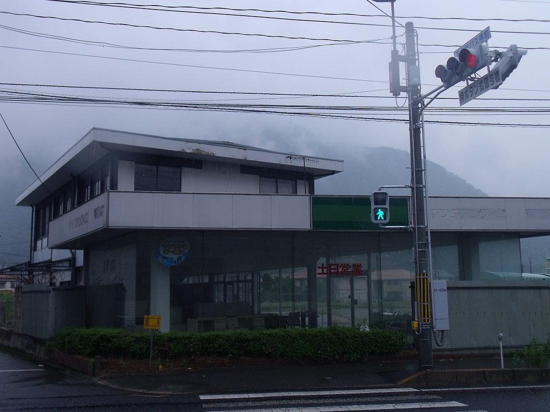 本人による撮影